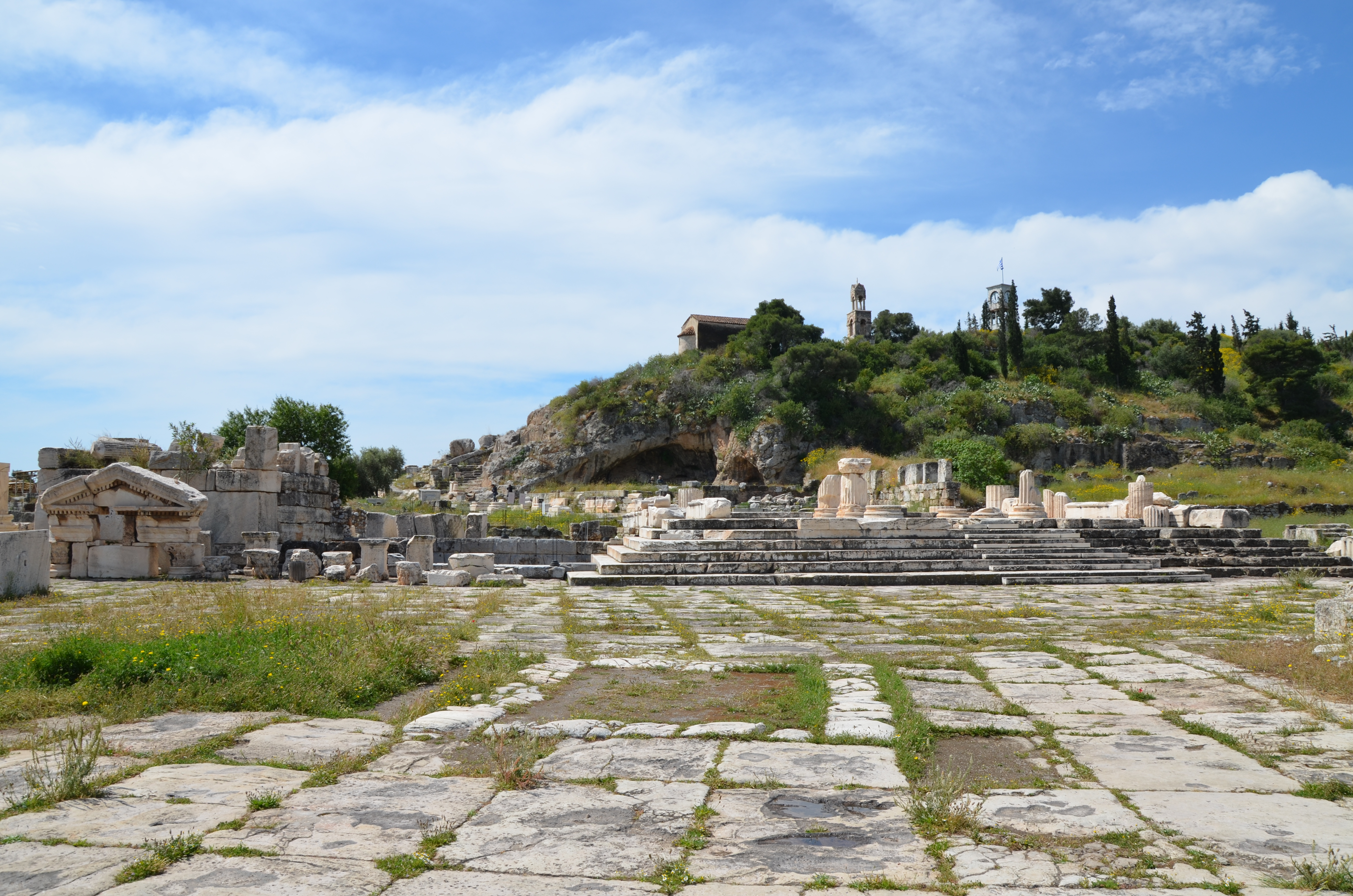 Eleusis